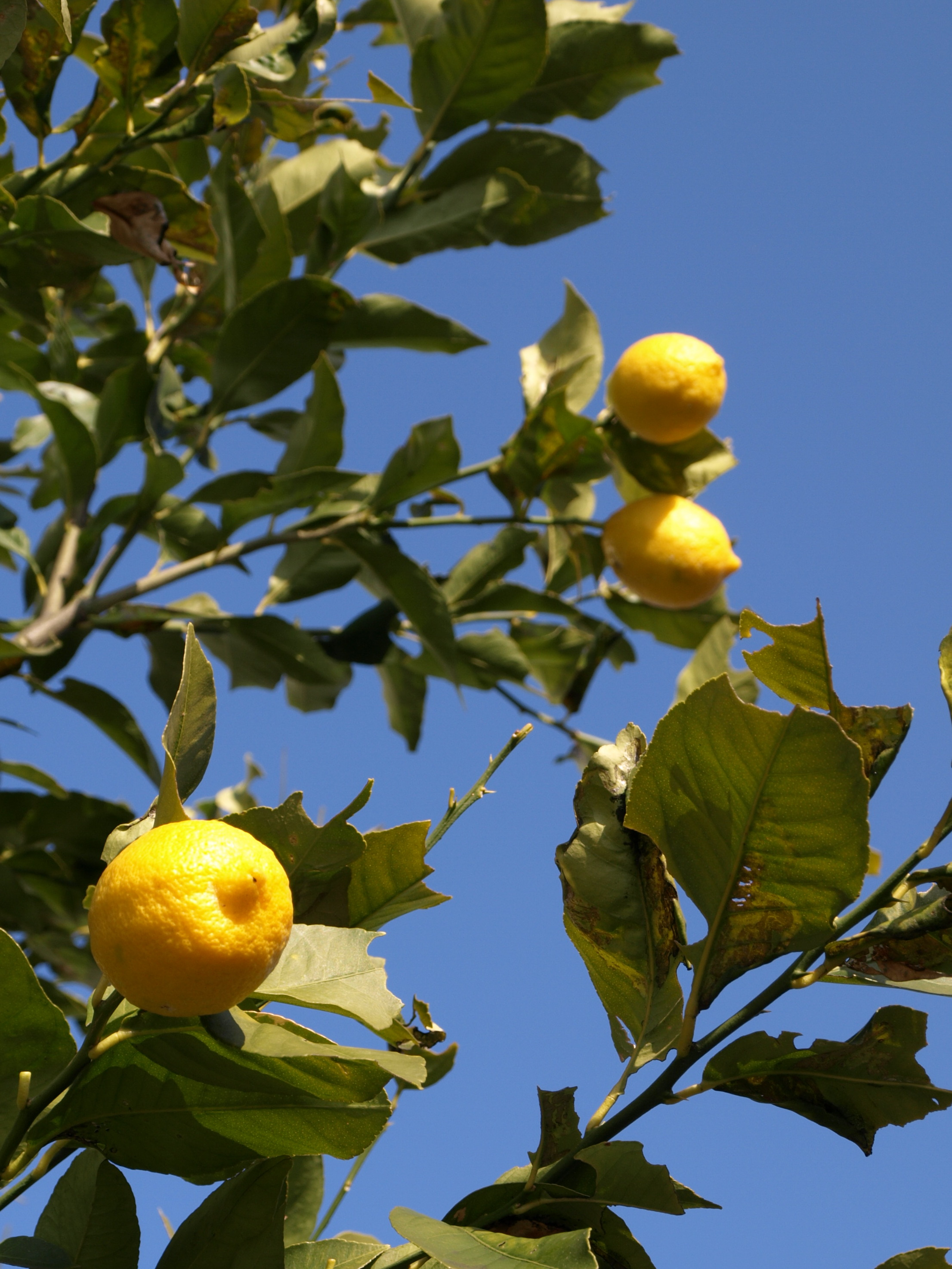 Lemon, Citrus x limon